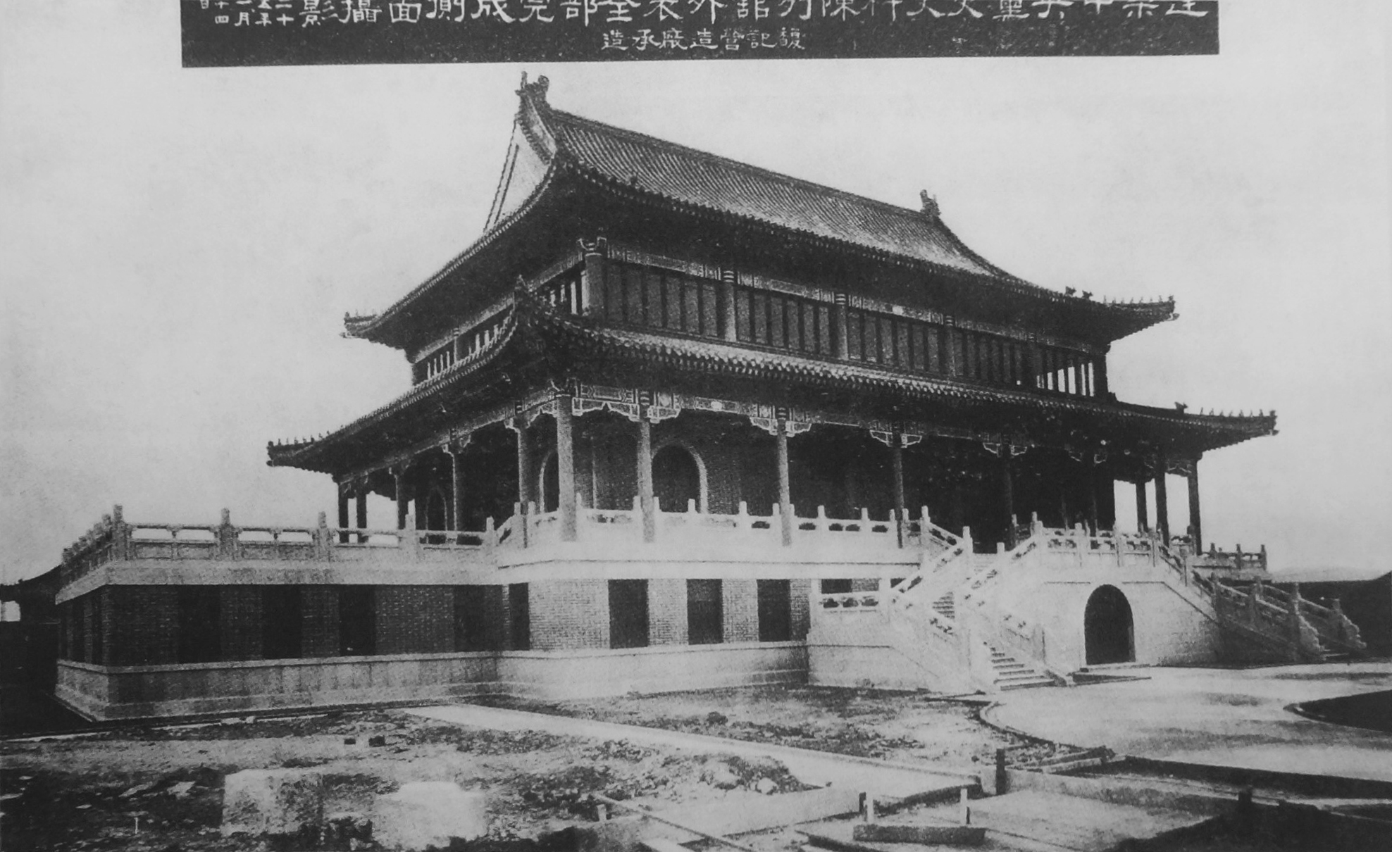 國立國父紀念館展示的中國國民黨中央黨史史料陳列館（今中國第二歷史檔案館）照片，拍攝日期為1936年1月14日。